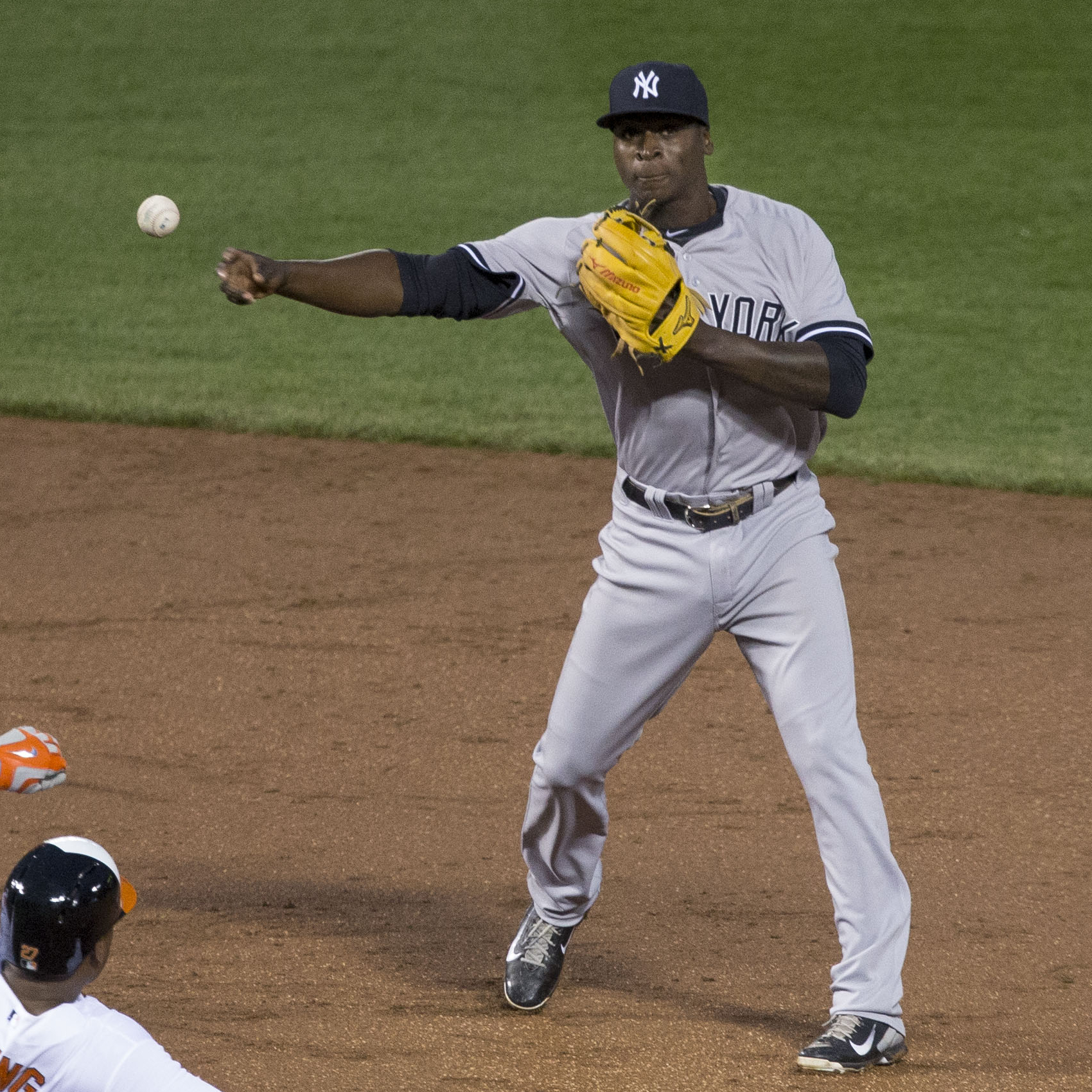 Didi Gregorius